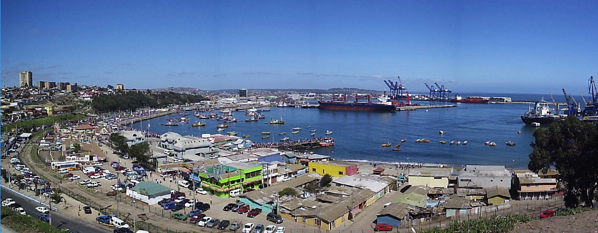 Vista panorámica del puerto de San Antonio (V Región - Chile)